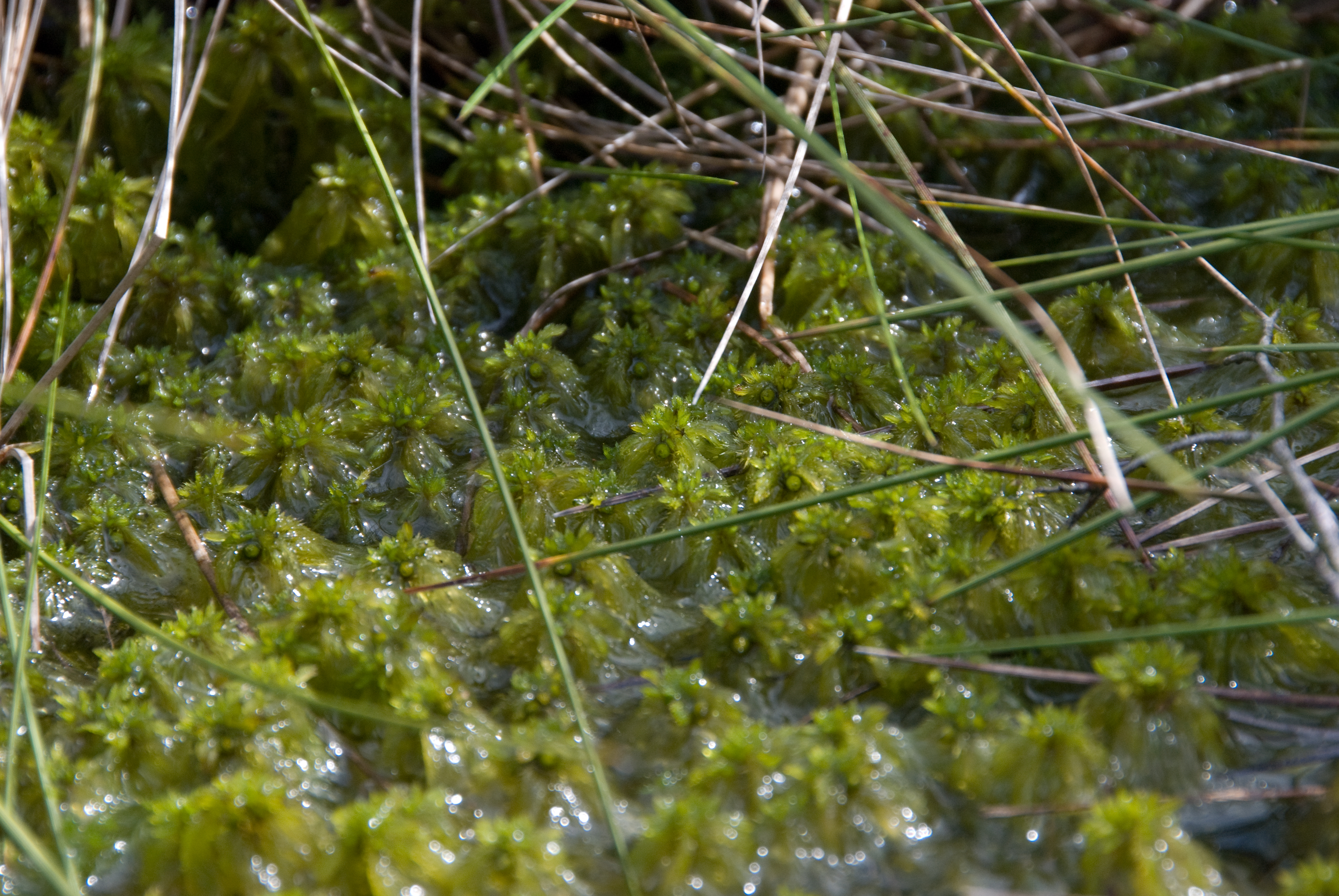 Torfmoose im Dosenmoor, Deutschland